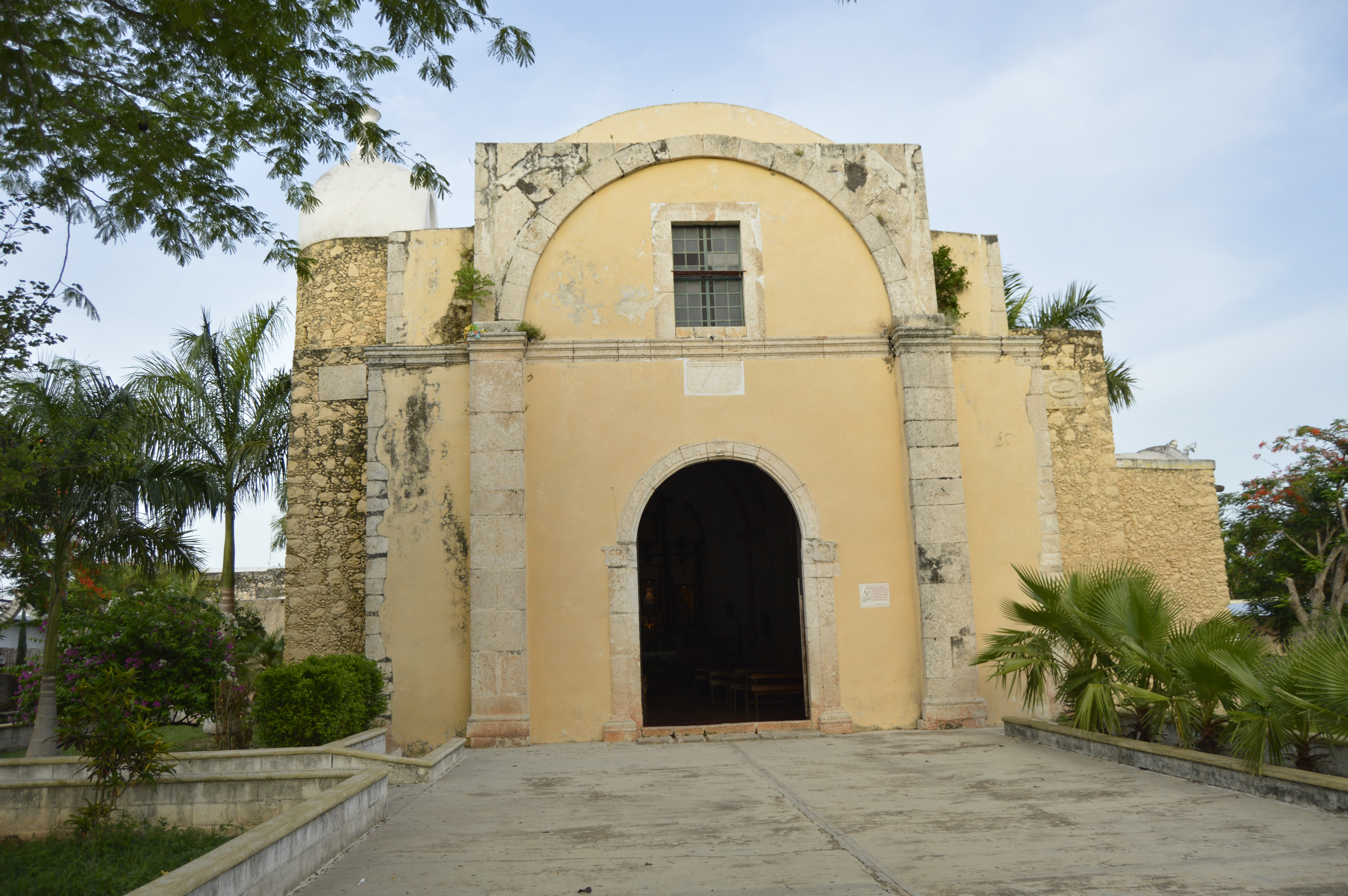 Chocholá, Yucatán.